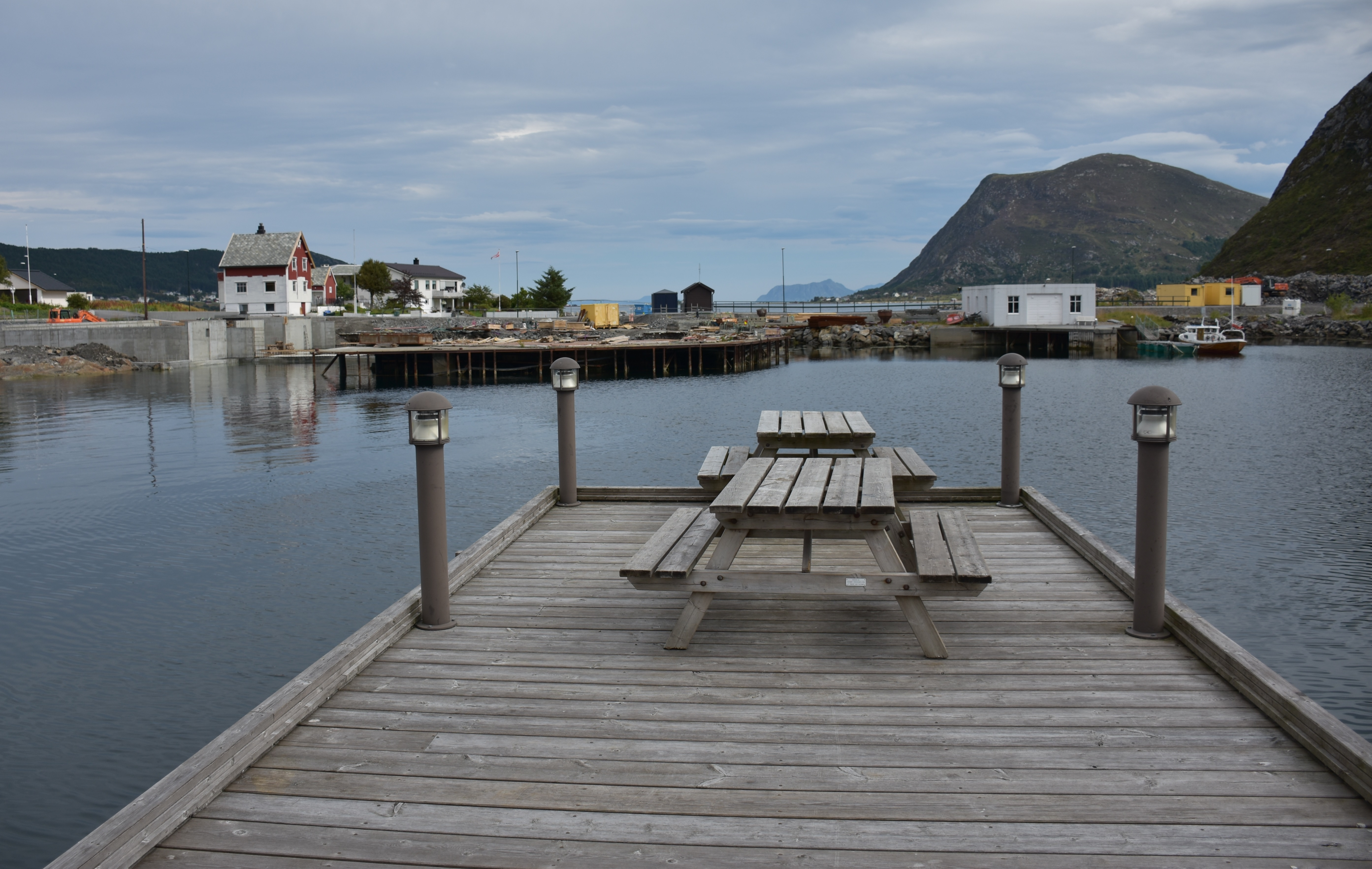 Fra havneområdet i Fosnavåg